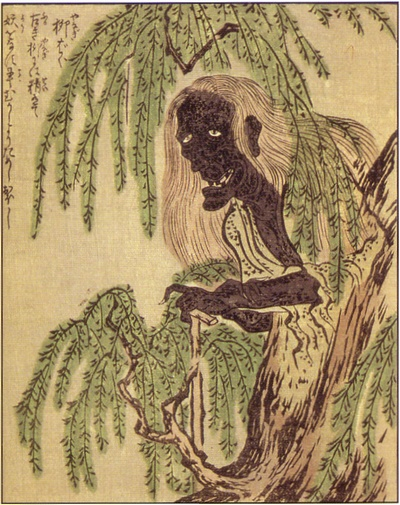 Yanagi-baba (柳婆) from the Ehon Hyaku Monogatari (絵本百物語)